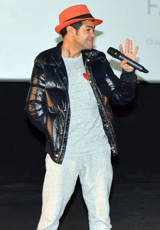 Jamel Debbouze à l'avant-première du film "La Vache"